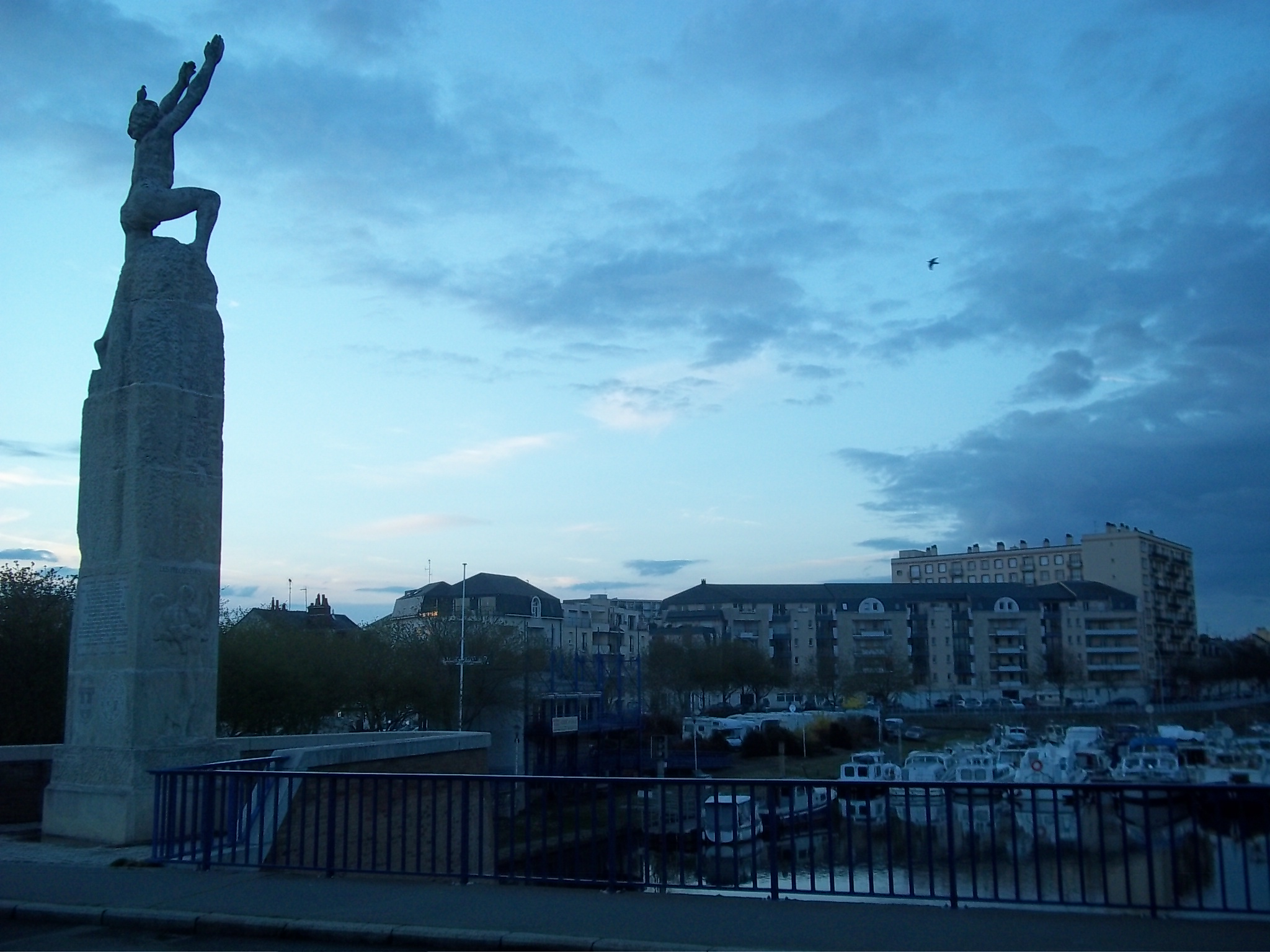 Statue en hommage au premier vol de Wilbur Wright avec le port - Le Mans